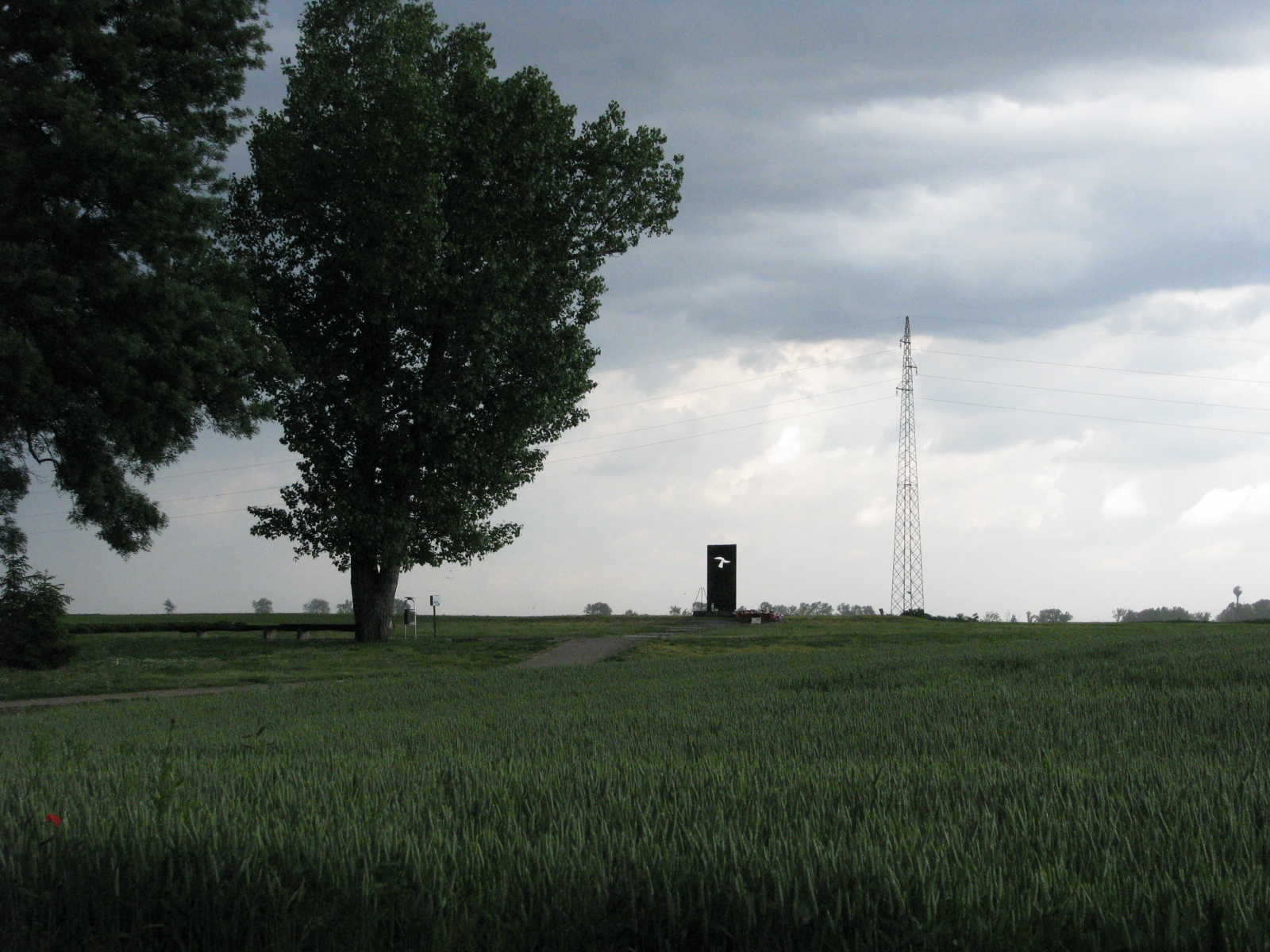 Spomenik žrtvama Domovinskog rata na mjestu masovne grobnice u Ovčari